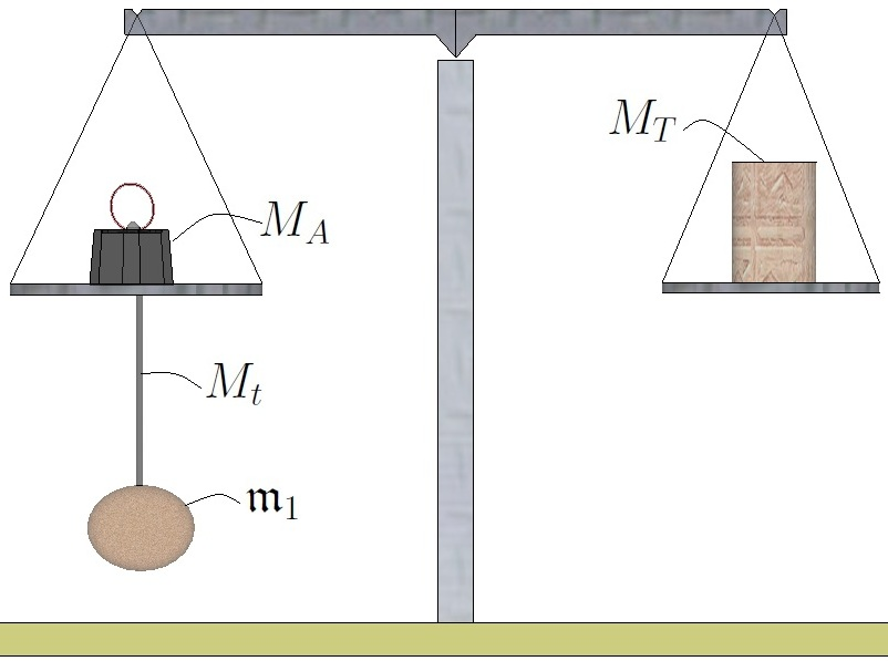 Mesure de la densité relative d'un corps solide (Site " Fascicules de physique. LEZE-LEROND ".)